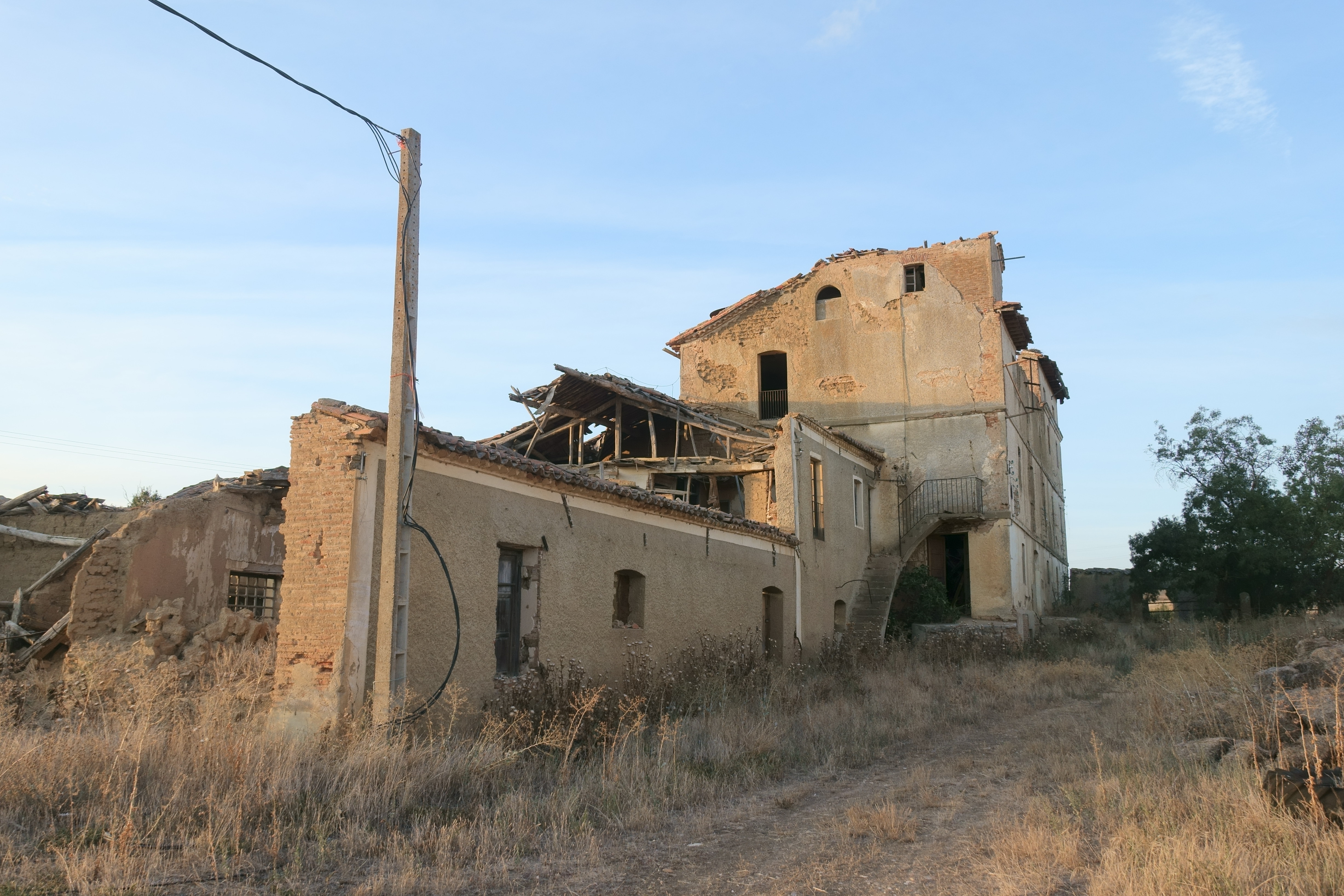 Antigua fábrica en Aspariegos (Zamora, España).